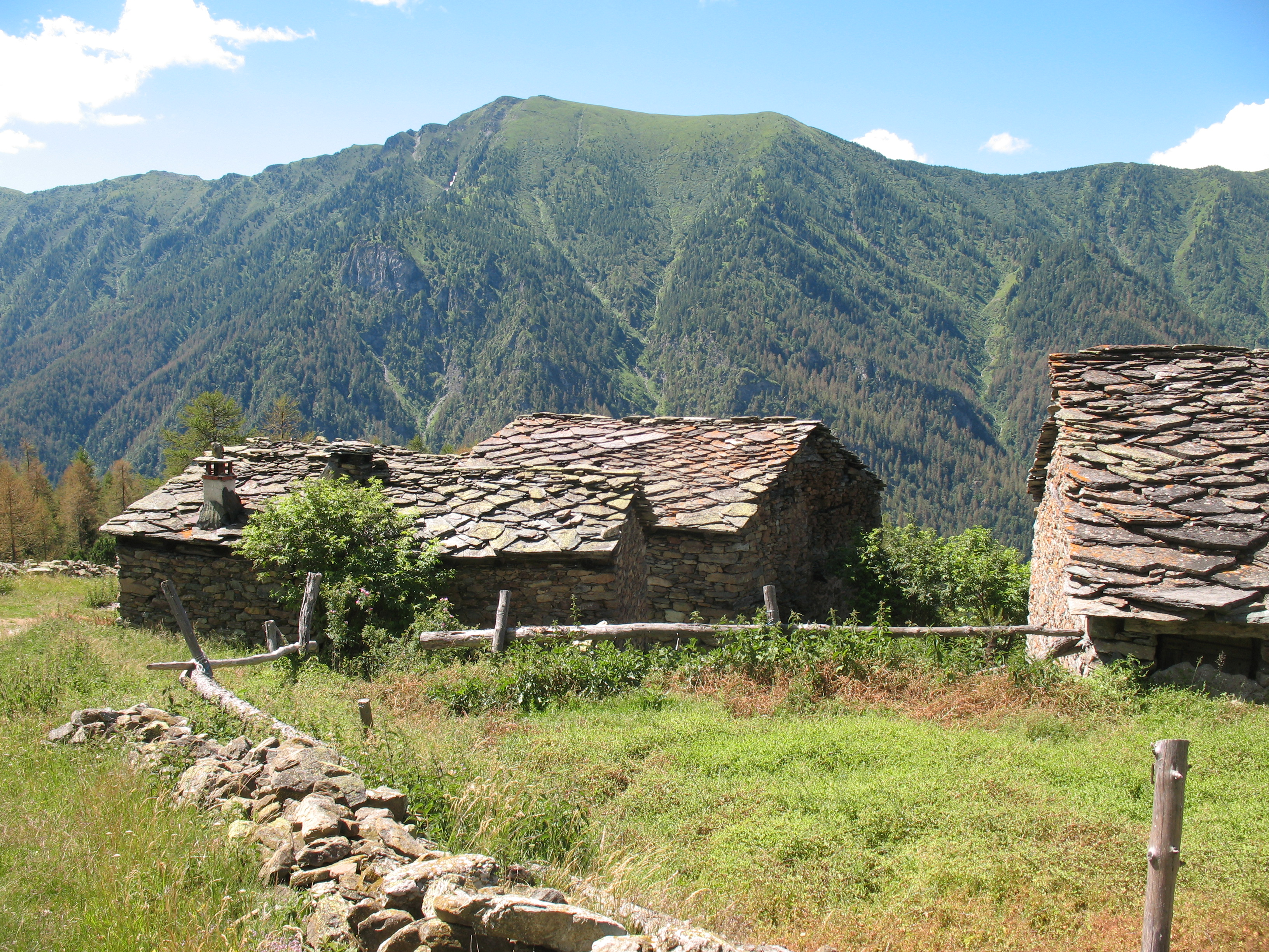 Gronge Pralambert, nördlich von Casteldelfino